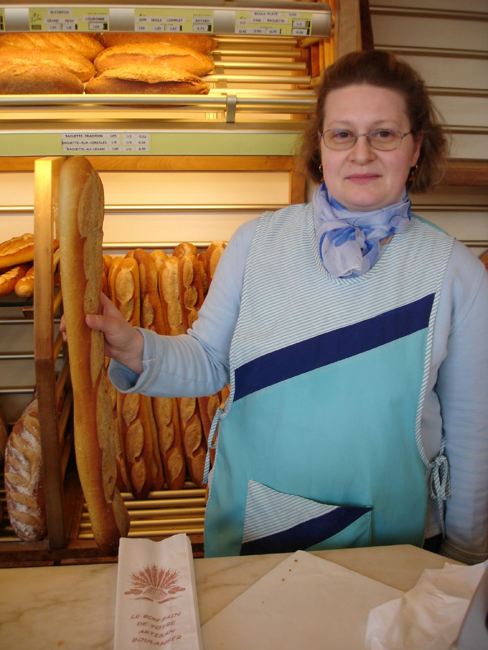 Argenteuil (Val-d'Oise, France) Localisation probable, déterminée par la consultation de l'image originale et de sa légende rédigée par l'auteur, sans oublier le module cartographique de Flickr qui pointe sur Argenteuil.